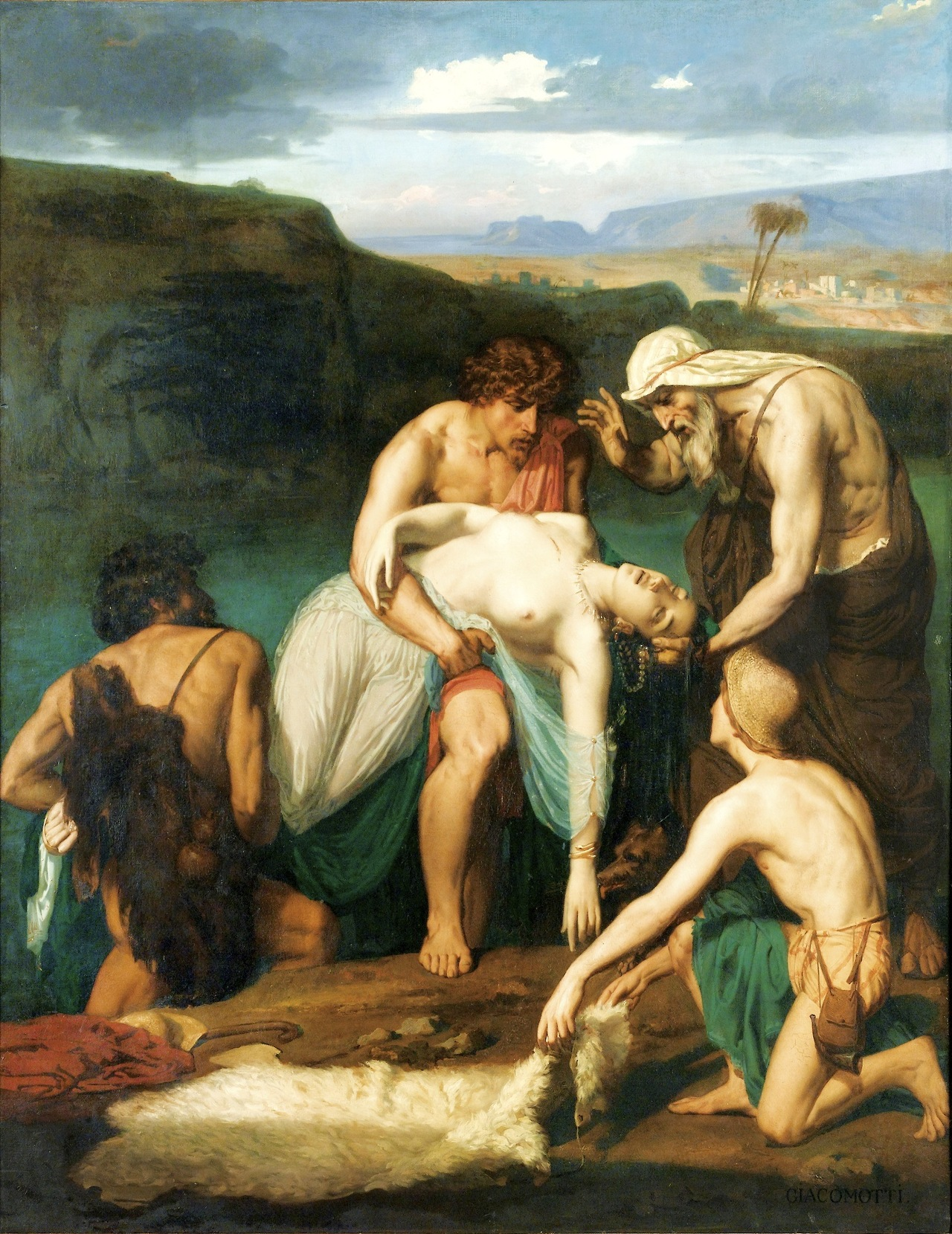 Giacomotti, Zénobie retrouvée sur les bords de l'Araxe, 1850, collection particulière